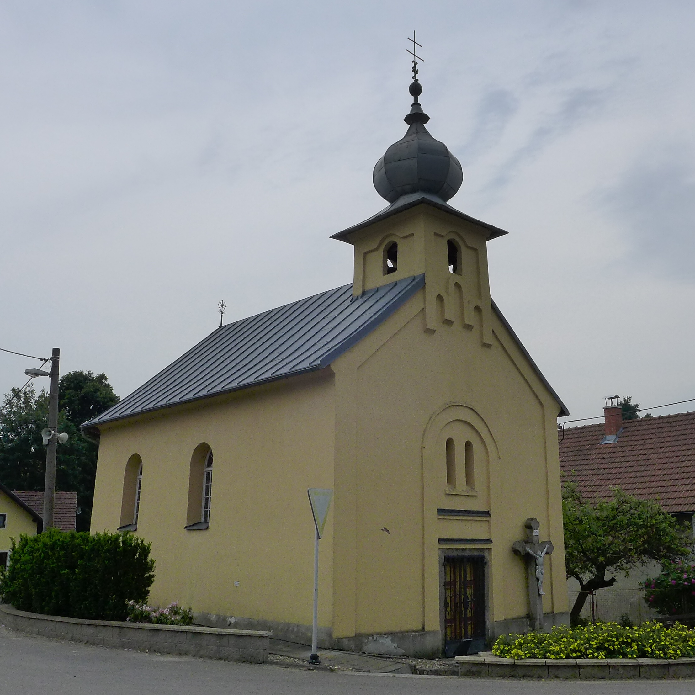 Kaple svatého Vendelína, náves, Arnolec.